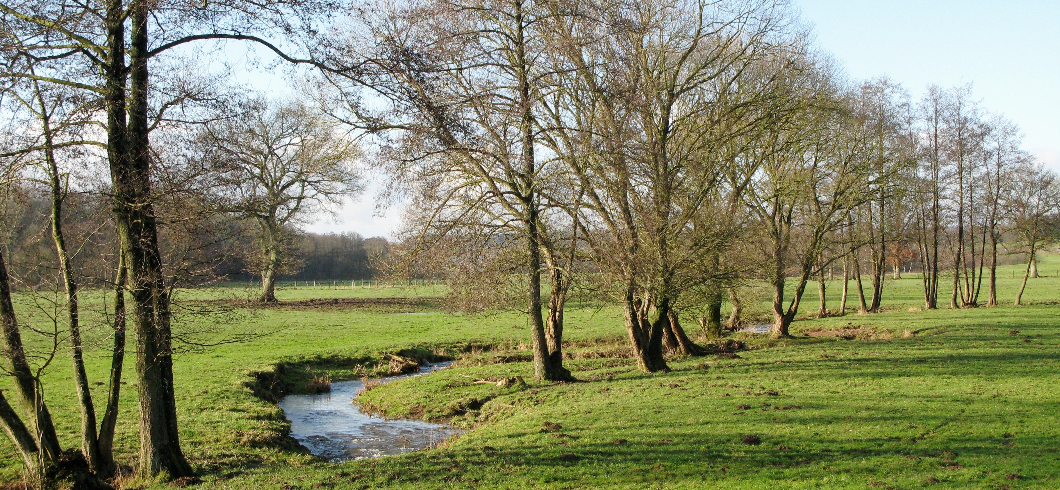 Koulbich eng ronn 100 Meter éier se an d'Atert leeft, an Direcktioun Kolpech gekuckt.